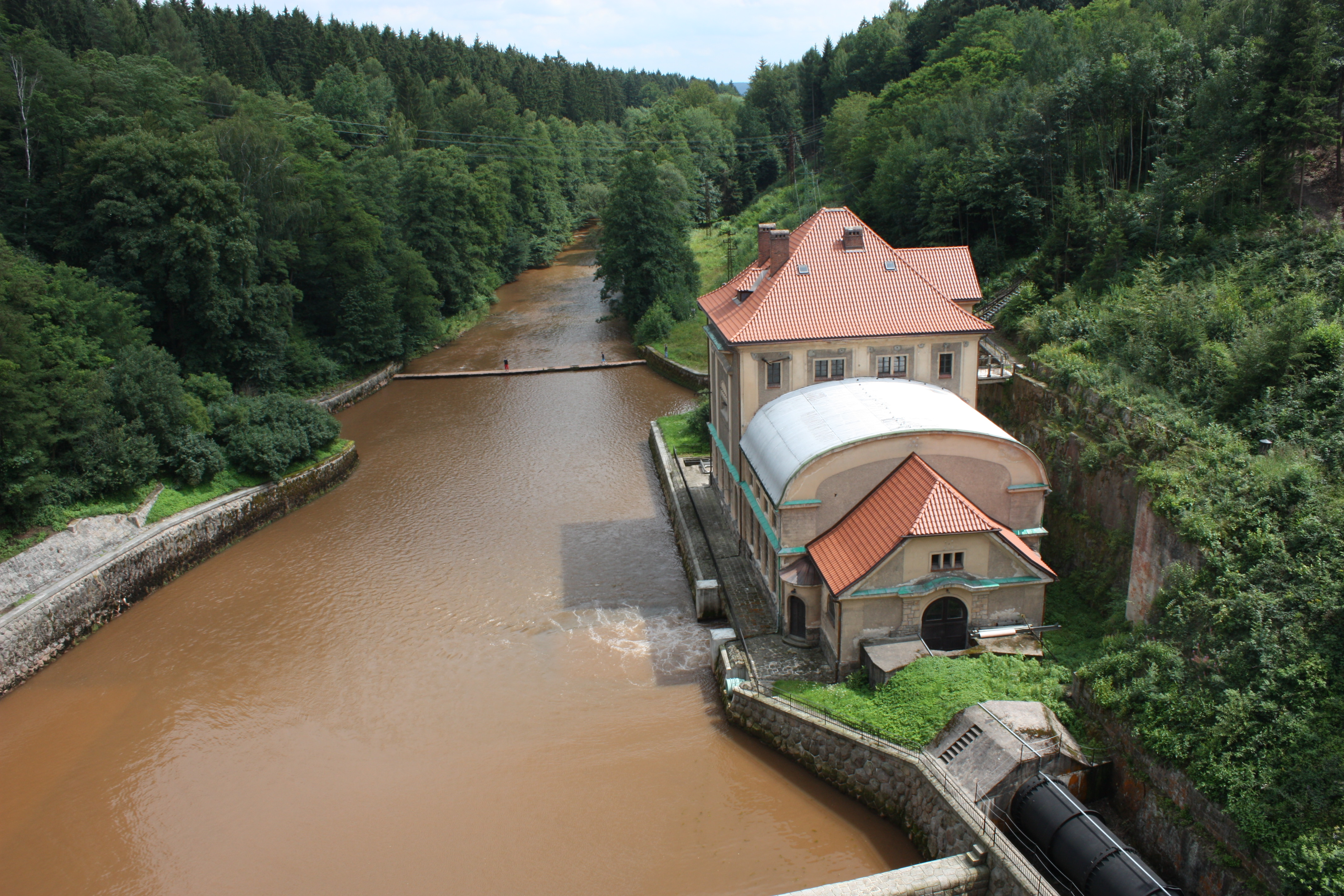 Přehrada Les Království